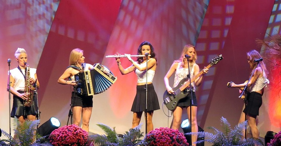 Navihanke na koncertu Ansambla Spev v Velenju.